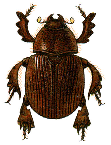 Dynatopus_atleta